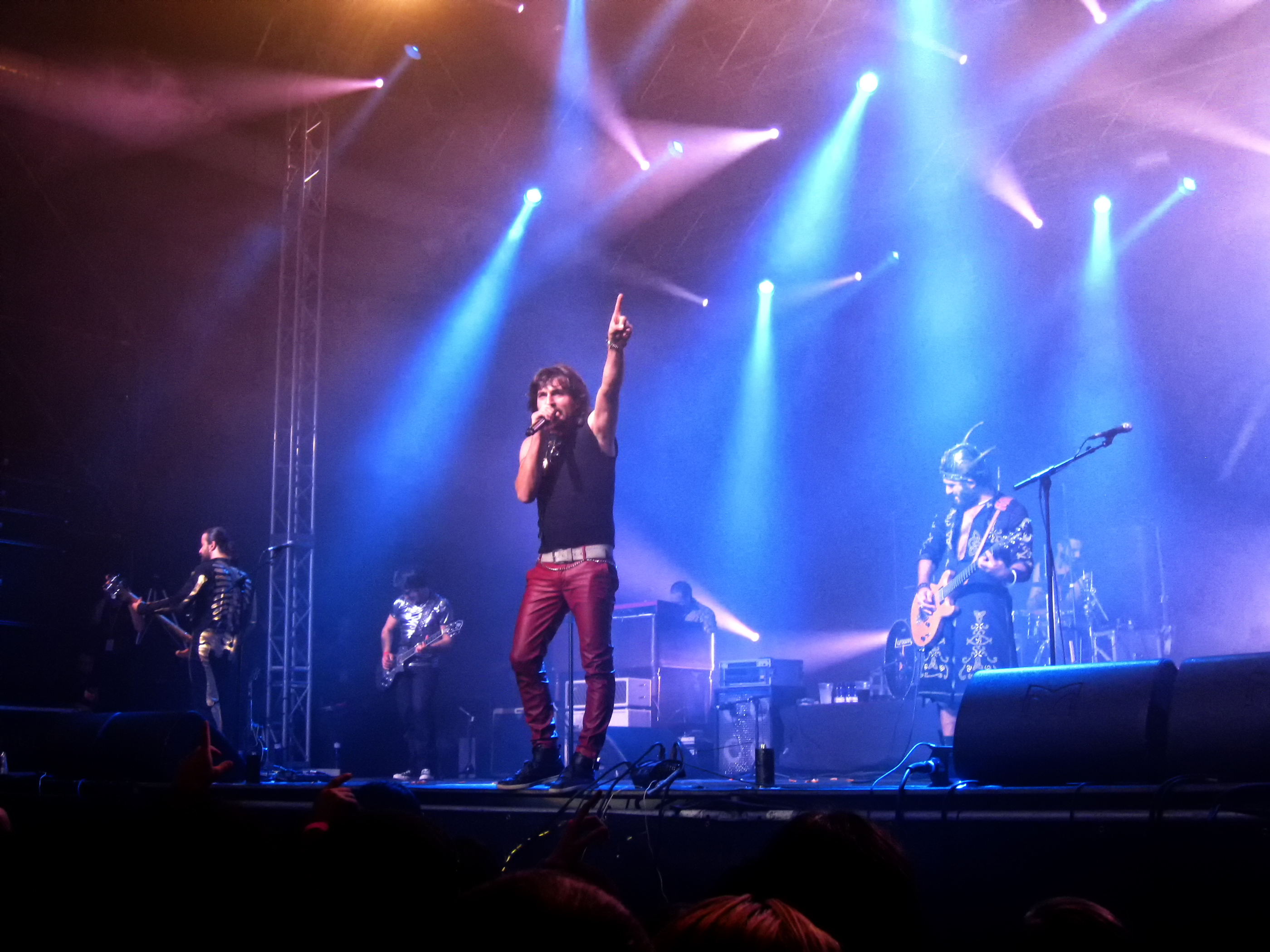 Heredeiros da Crus ao vivo no festival Music Way.